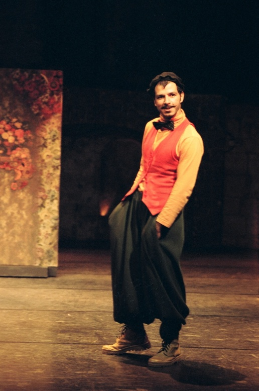 יוסי עיני כלה פלש בהקמצן